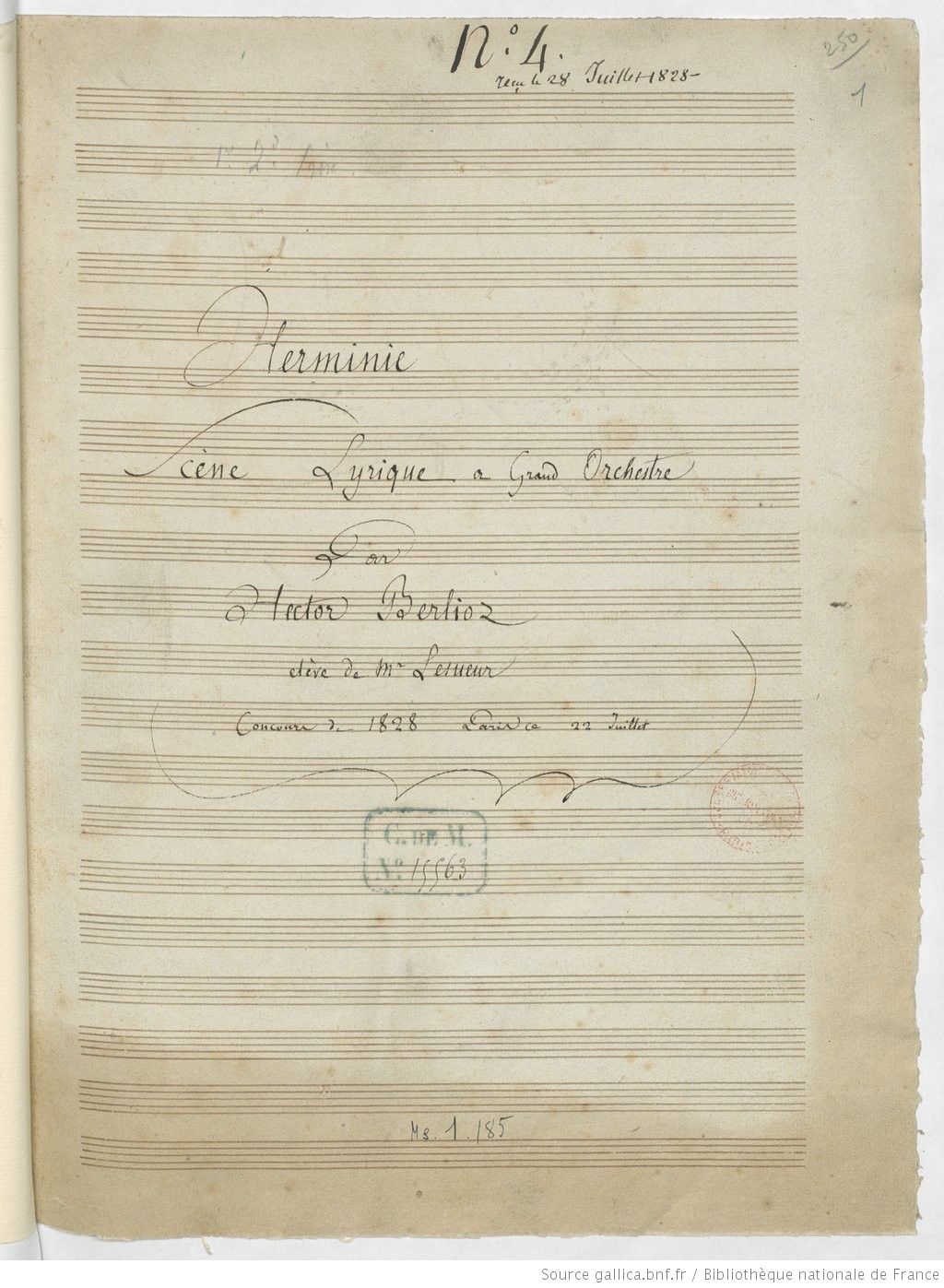 page de titre du manuscrit de "Herminie" d'Hector Berlioz, cantate pour le prix de Rome, 1828